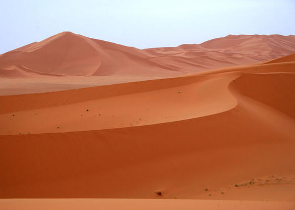 Dune nell'Idehan di Murzuq - Fezzan (Libya) Licensing Categoria:Geografia della Libia